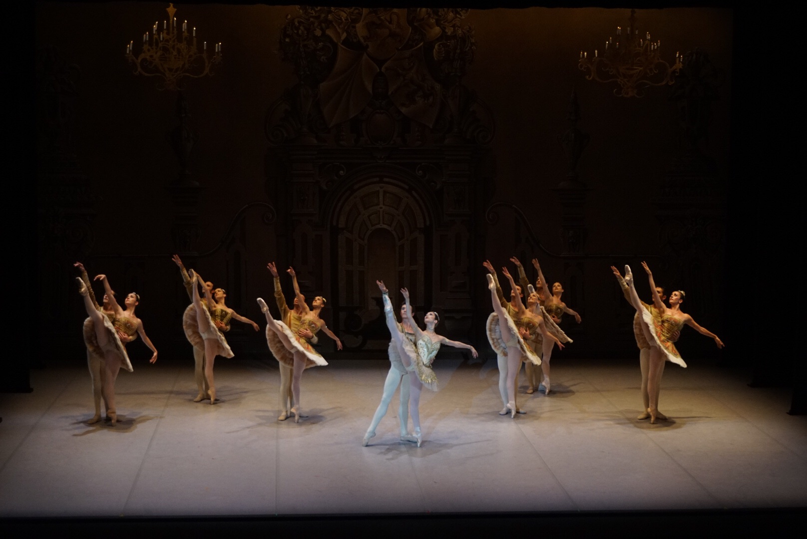 Raymonda Divertimento coreografía, José Carlos Martínez Compañia Nacional de Danza